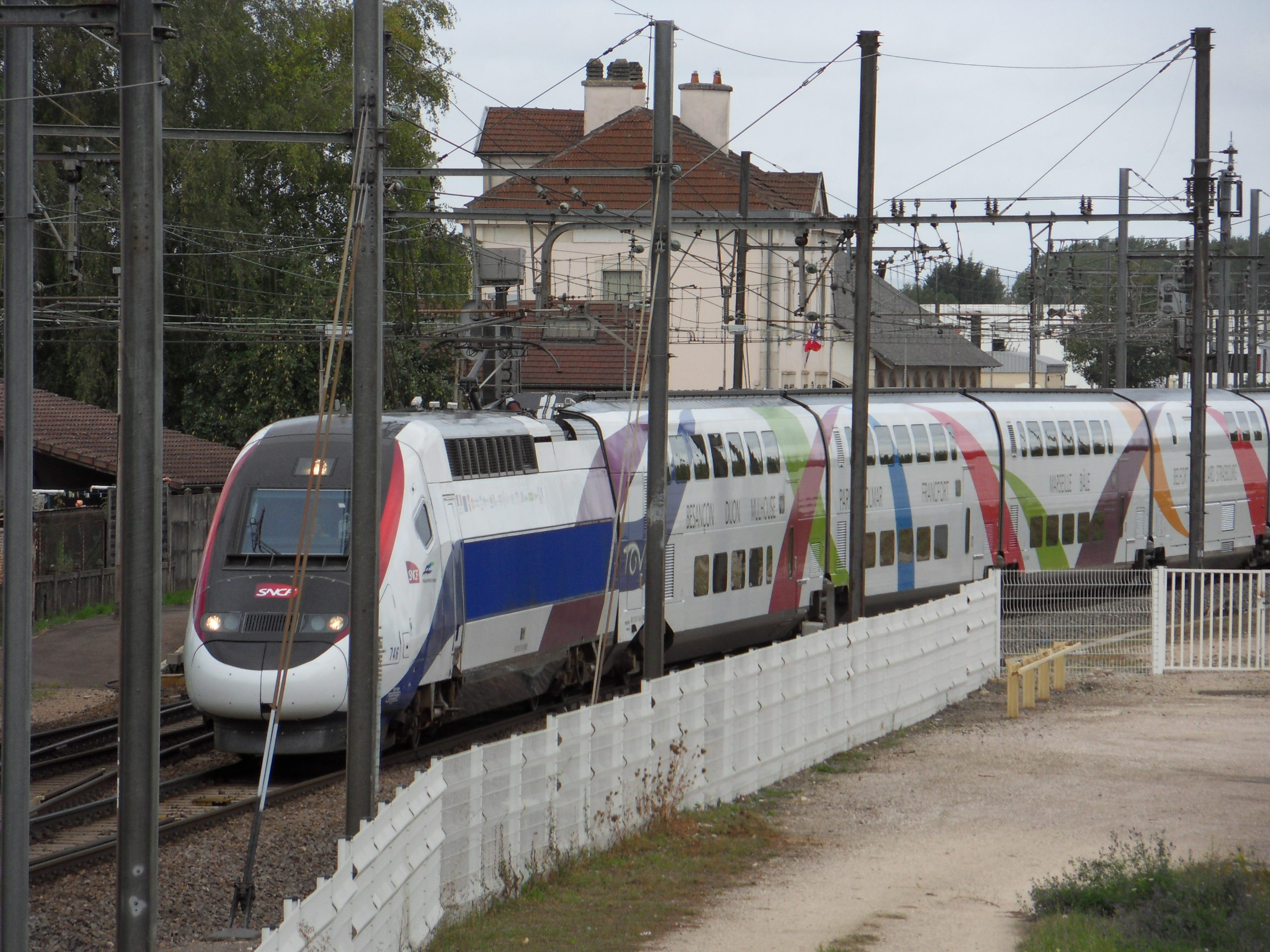 LGV Rhin-Rhône. La rame de TGV inaugurale Duplex Dasye numéro 746 du 08 septembre 2011 avec à son bord les personnalités et le président de la République Nicolas Sarkozy part de l'évitement impair de Genlis pour circuler sur les 140 km de la ligne. En arrière-plan la gare de Genlis.